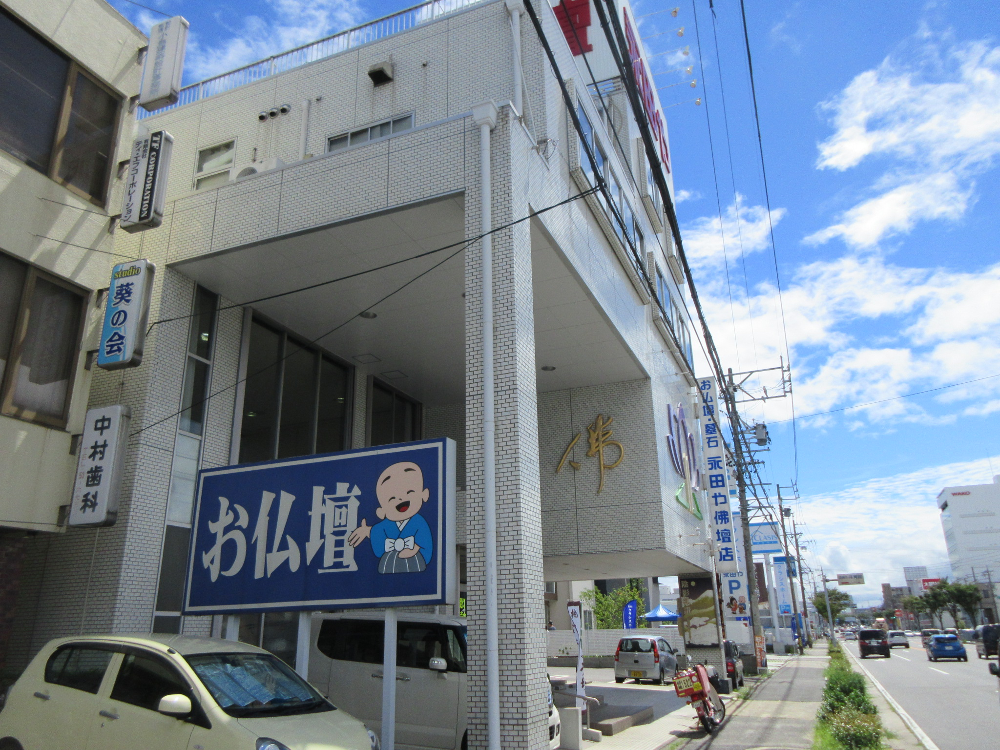 永田や佛壇店（愛知県岡崎市）